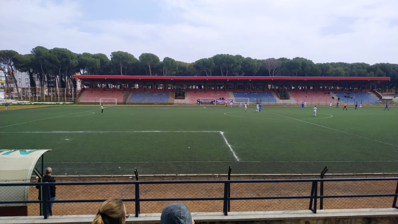 Ödemiş Saraçoğlu Stadyumu, İzmir.